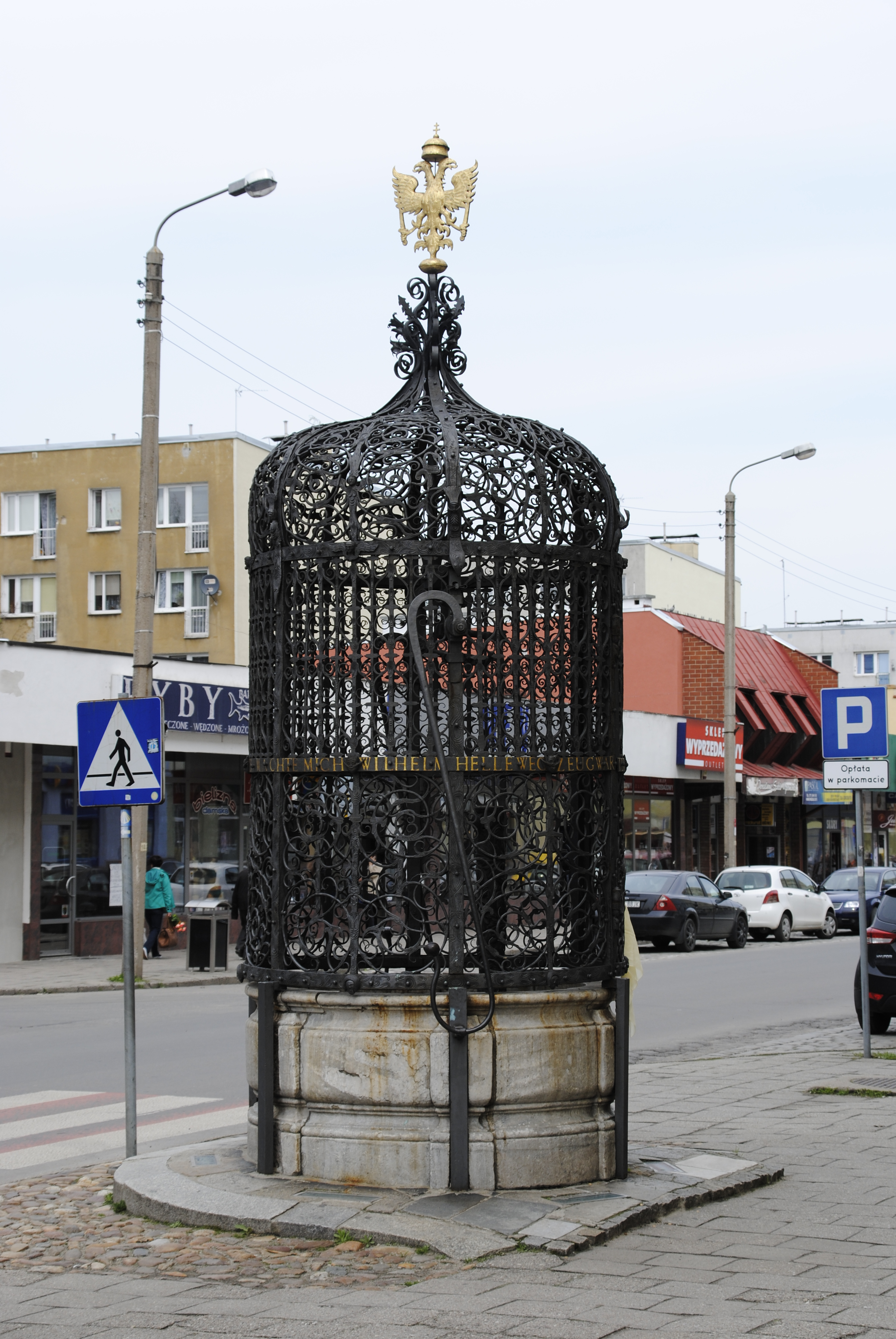 Schöner Brunnen in Neisse/Oberschlesien